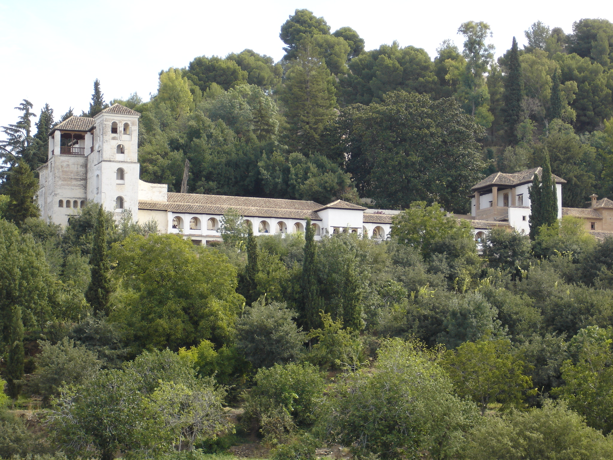 Vue_du_generalife Copyleft Je suis l'auteur de cette photographie